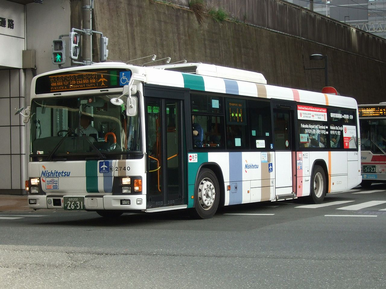 西鉄バス 天神・博多駅 - 福岡空港国際線ターミナル連絡バス / Nishitetsu bus Fukuoka Airport International Line Terminal shuttle bus